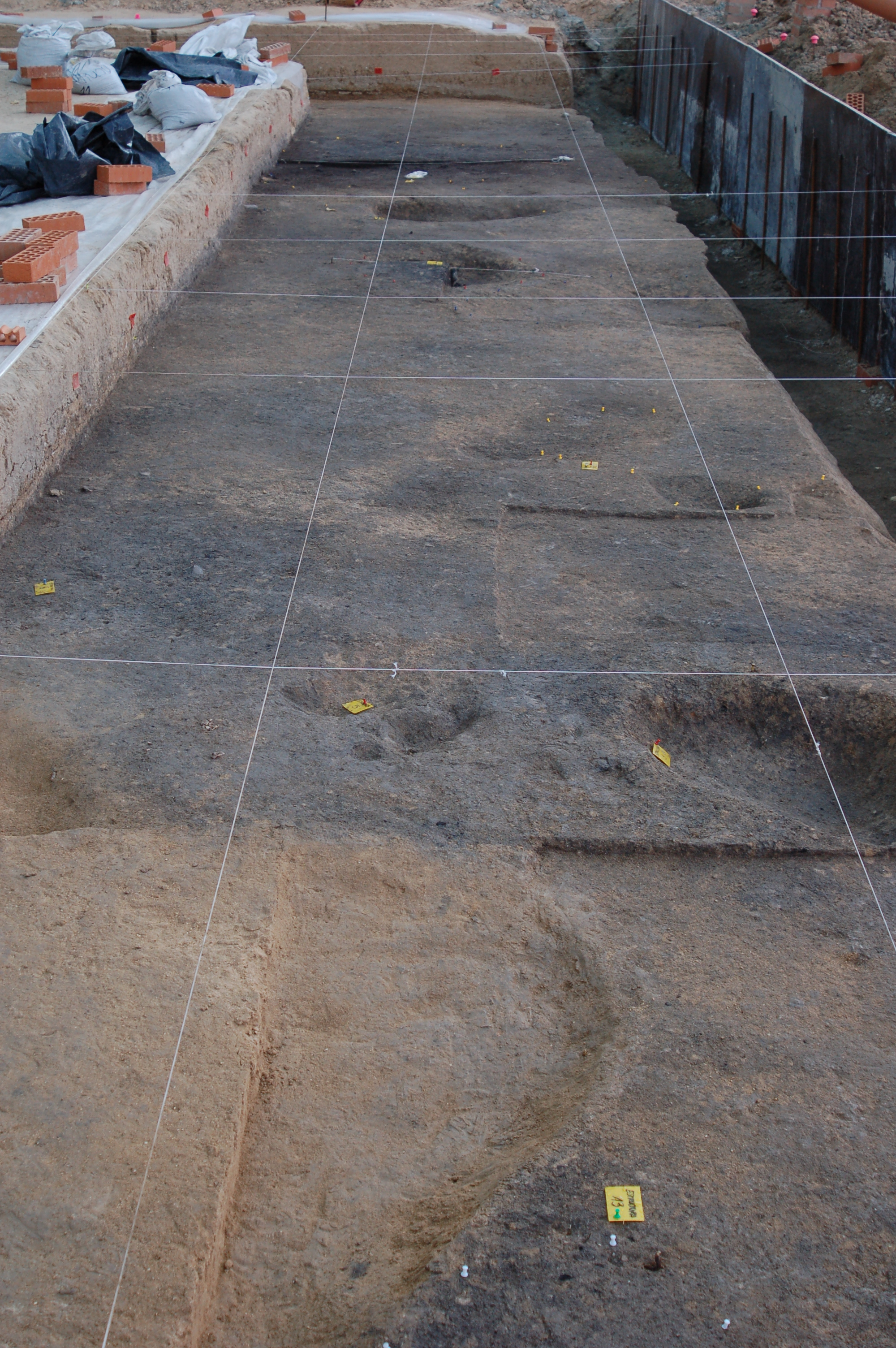 foto de la excavación del yacimiento epipaleolítico del Parque Darwin, Madrid (España).